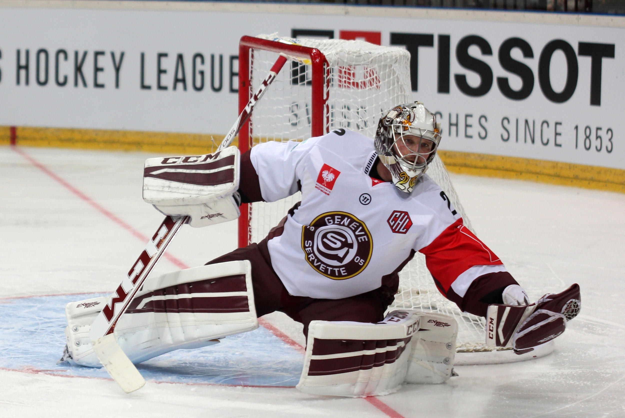 Robert Mayer (G 29).